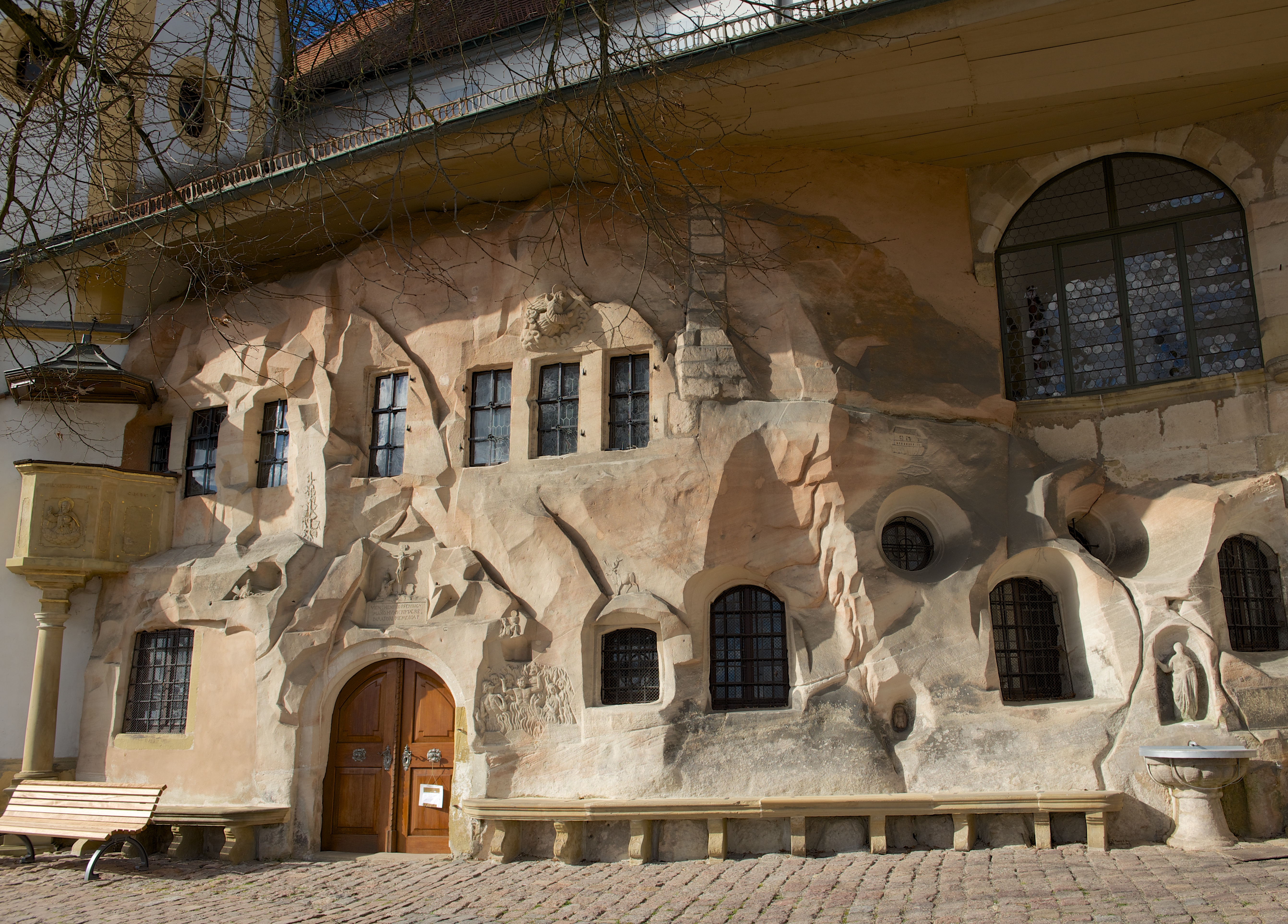 Details an der Salvatorkirche in Schwäbisch Gmünd